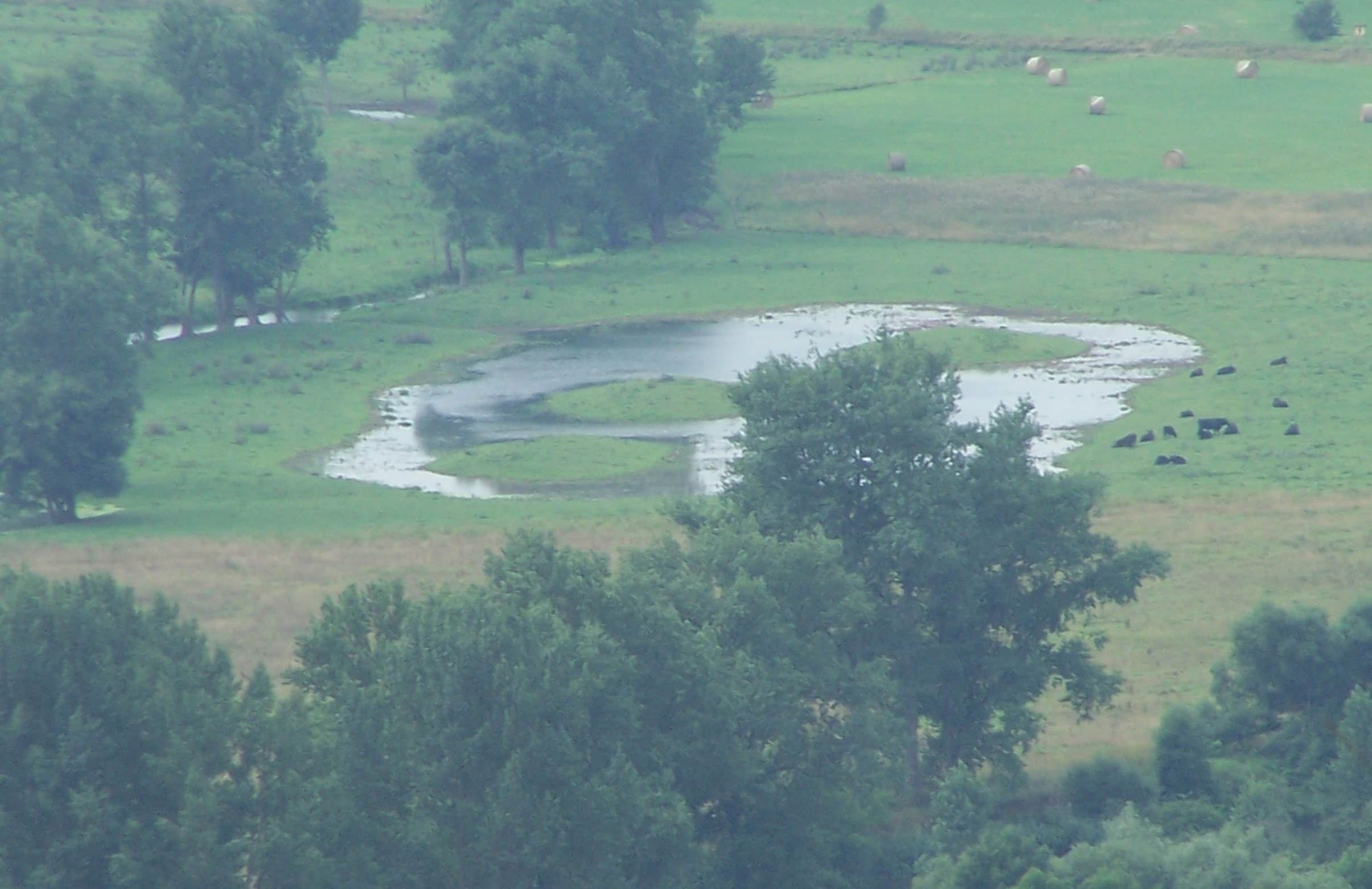 Ein Feuchtbiotop am Werraufer bei Creuzburg.